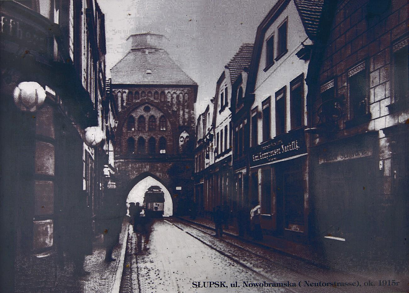 Ulica Nowobramska około 1915 roku. Jedno z archiwalnych zdjęć prezentowanych na ulicach Słupska.